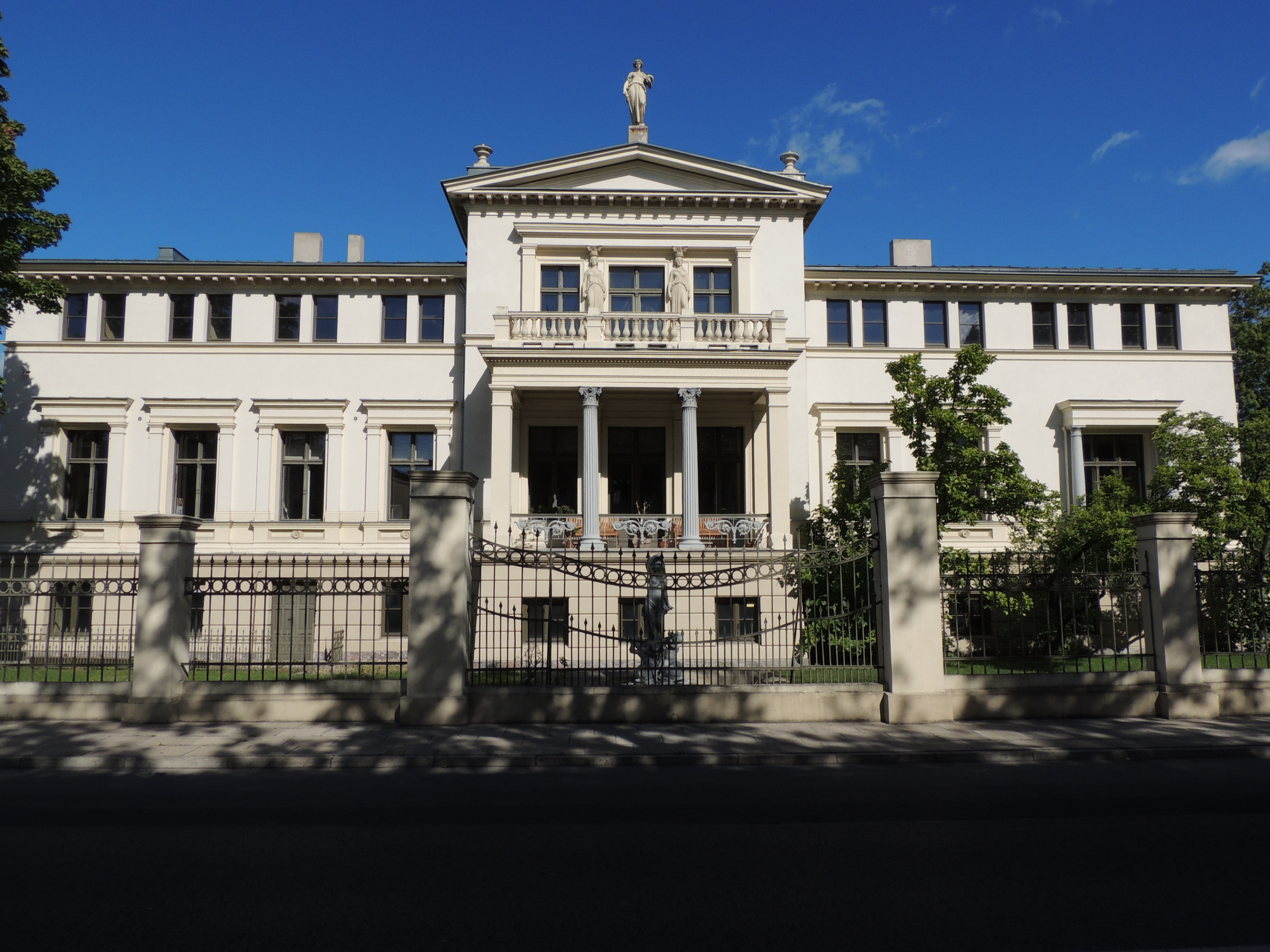 Ozorków, Łęczycka 7, pałac Schlosserów